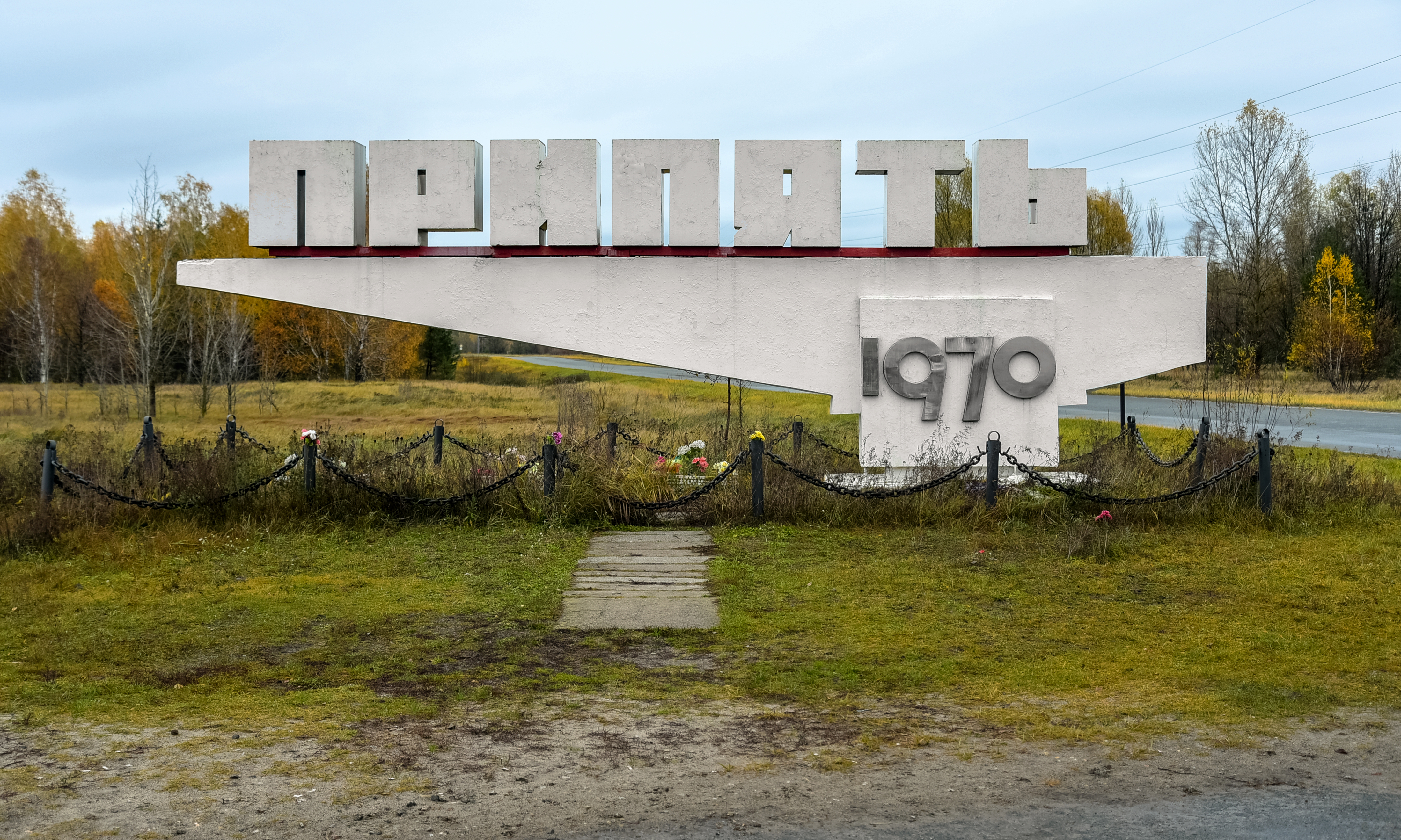 Pripyat (Ukraine)